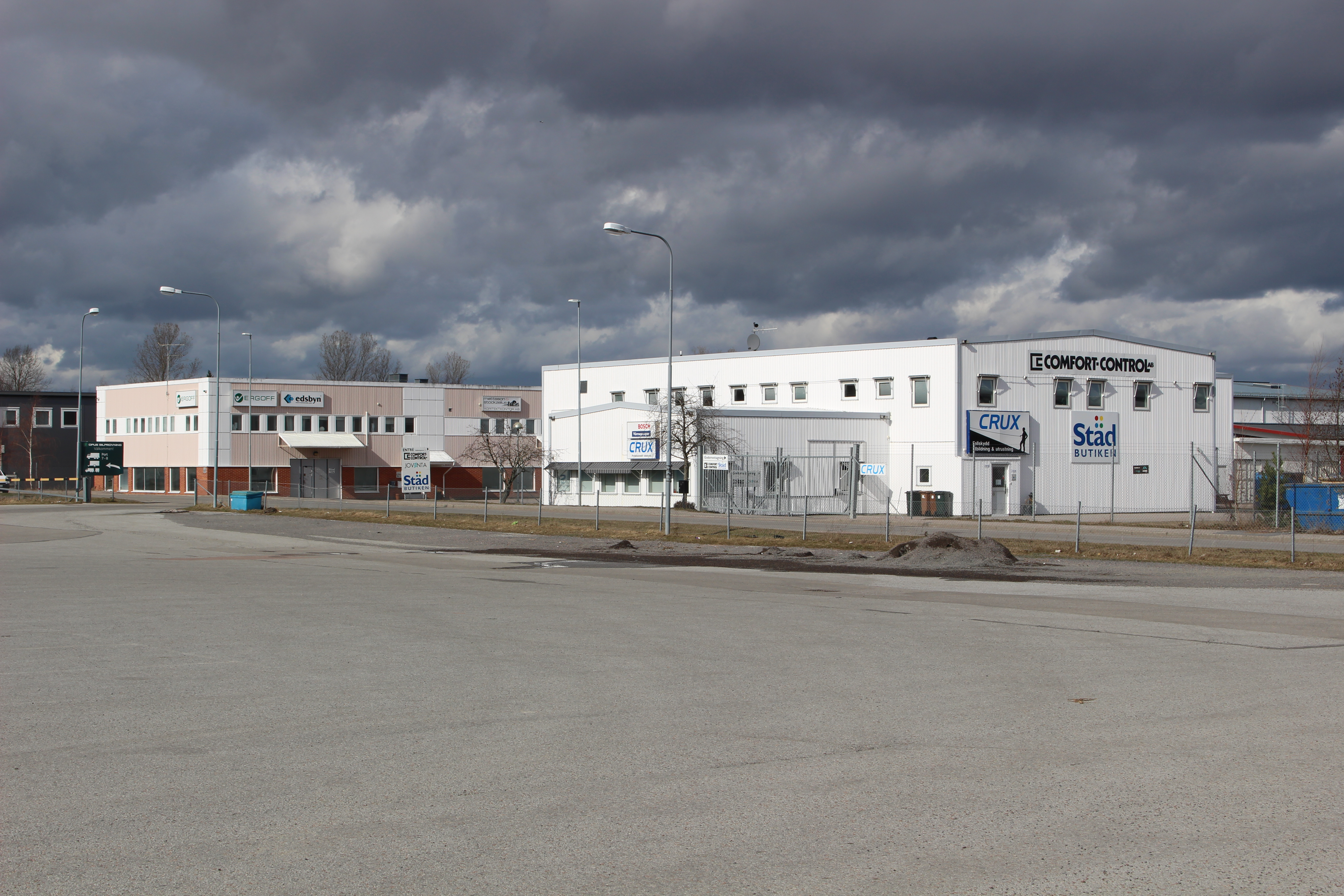 Fastigheter i nordvästra delen av Librobäck.